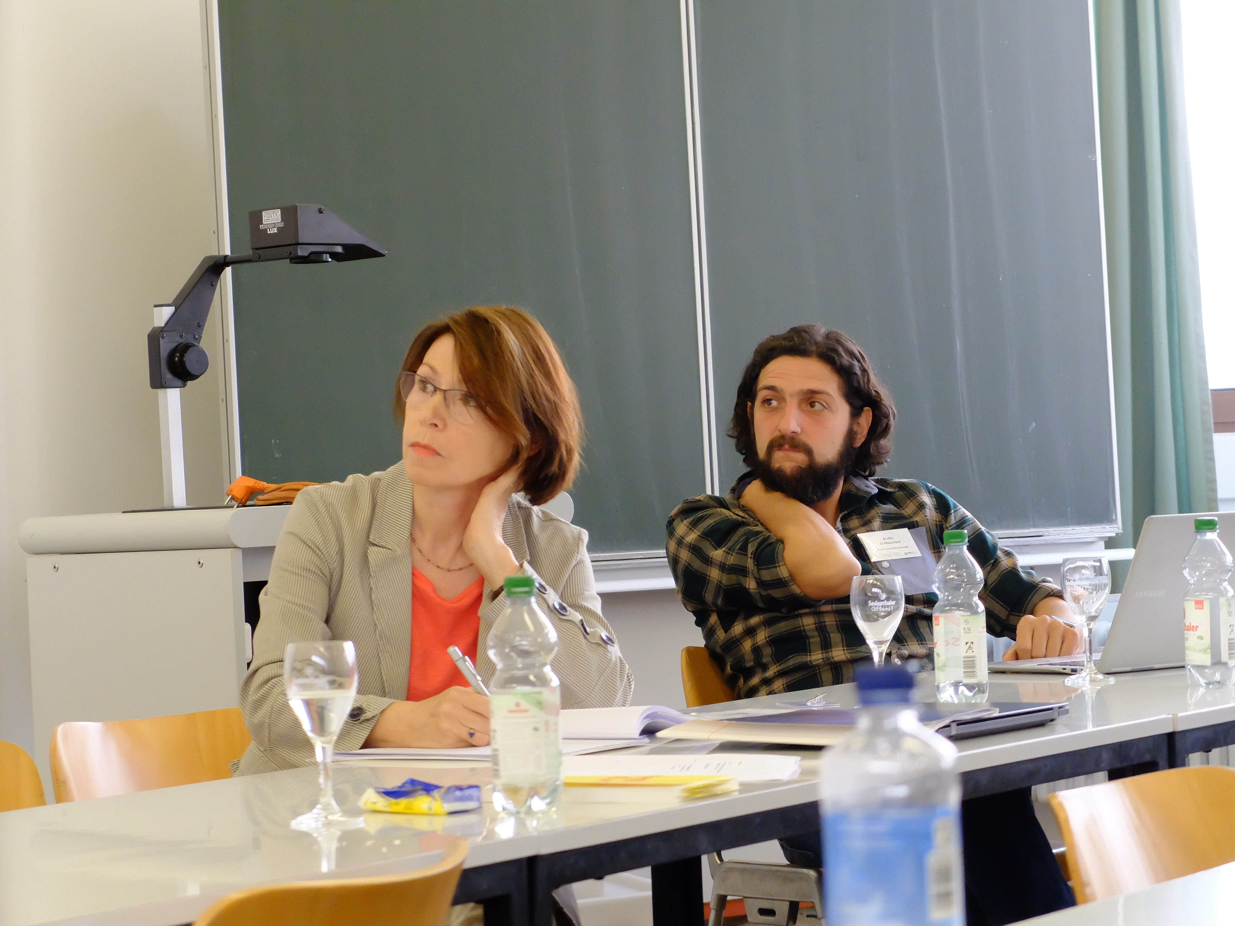 Die Soziologen Annette Treibel und Aladin El-Mafaalani auf dem Kongress der Deutschen Gesellschaft für Soziologie, Bamberg im September 2016.